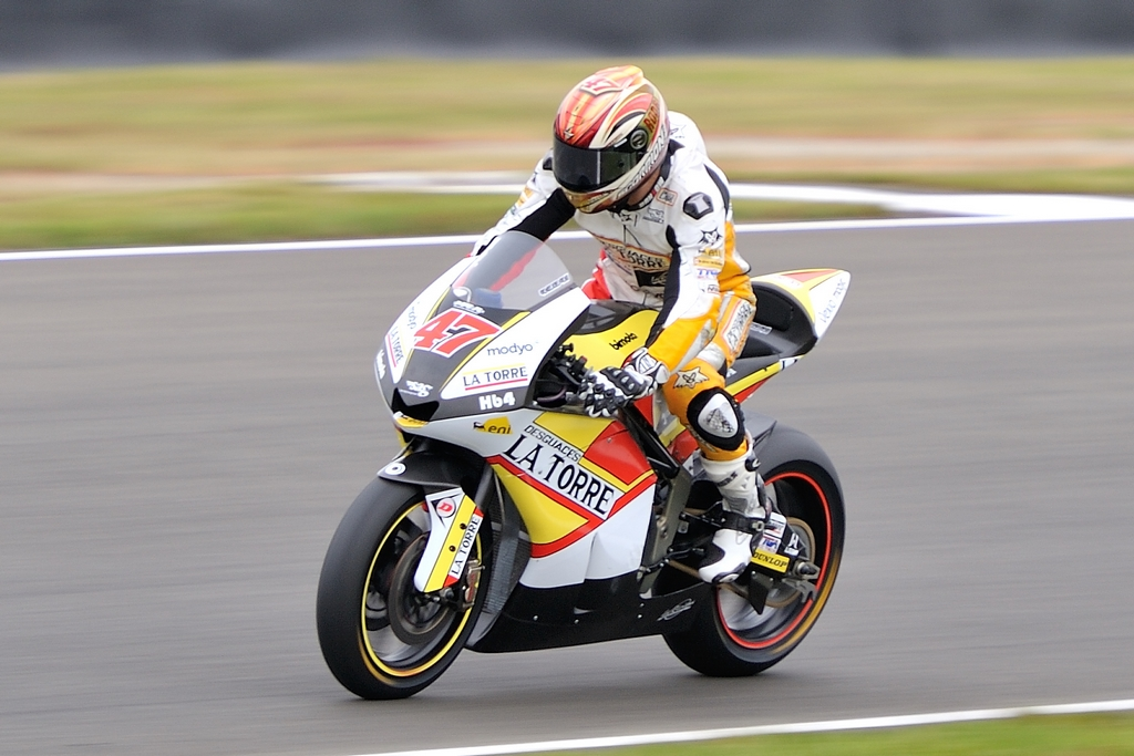 Angel Rodriguez sur la Bimota HB4